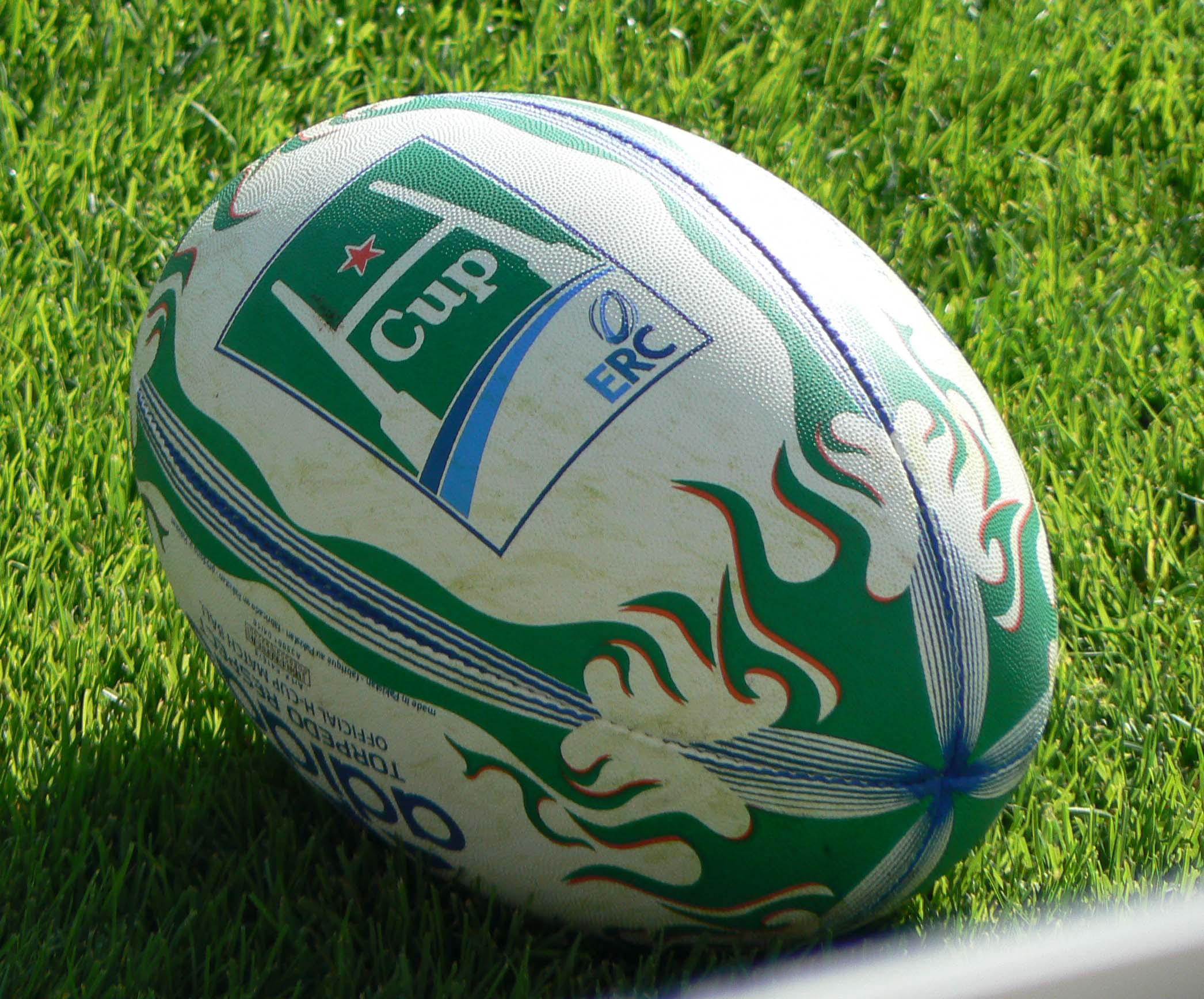 Le ballon version 2010-2011 de la coupe d'Europe de rugby à XV.